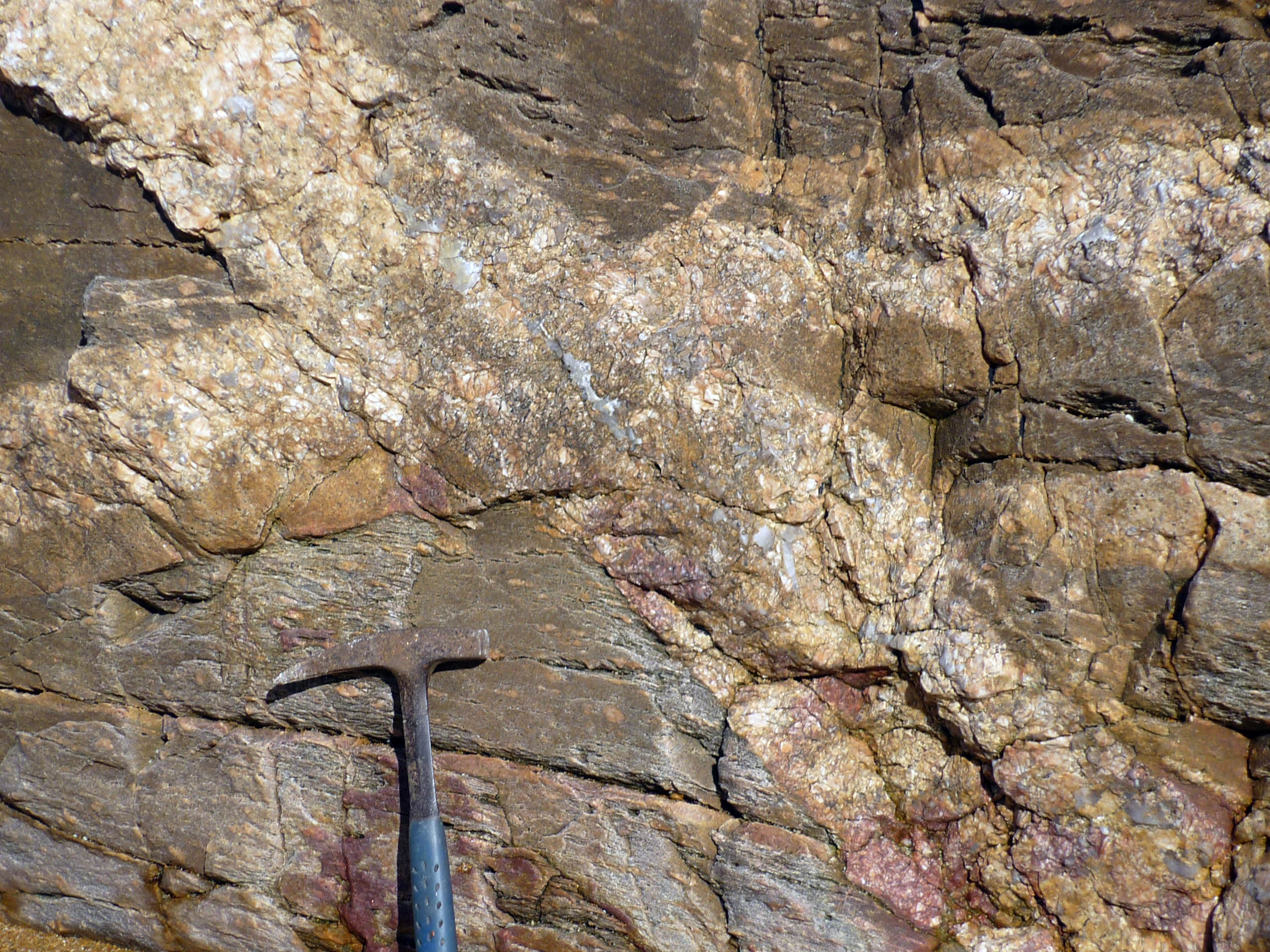 La Chaume, Sables d'Olonne,Vendée, France: filons de pegmatite en croix dans la roche